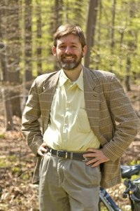 Paquette